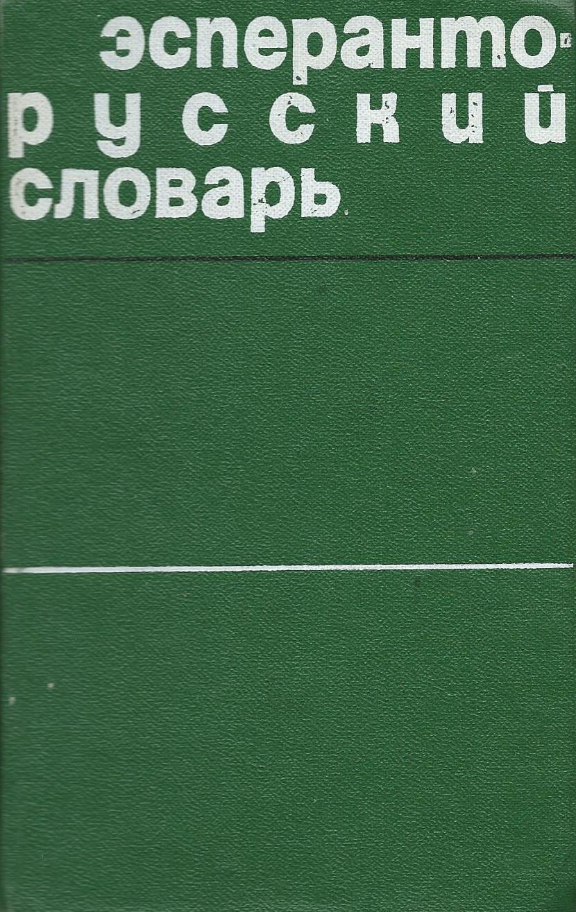 librokovrilo de la vortaro Esperanta-Rusa de E.A. Bokarev, 1974